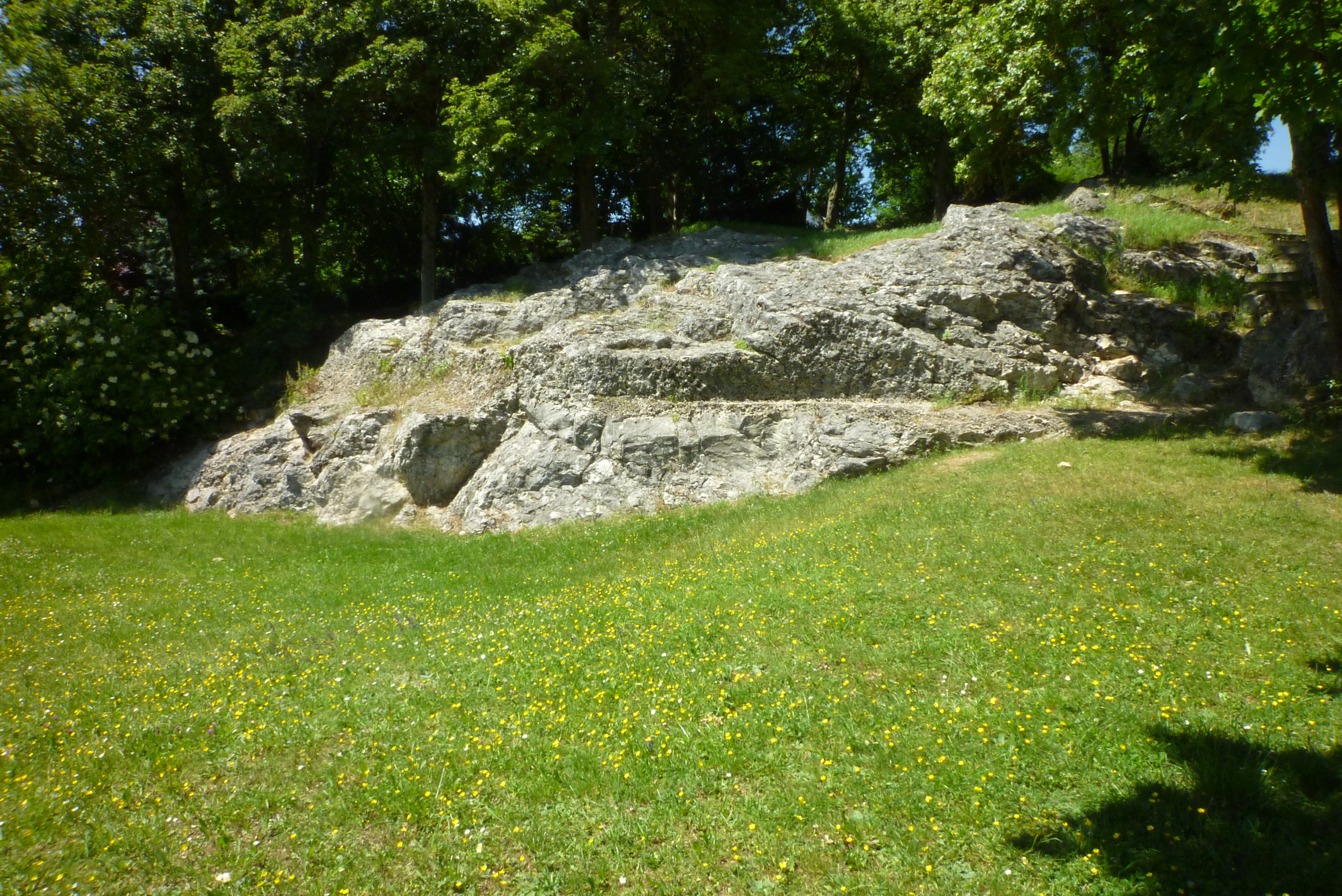 Gerstetten - Heldenfinger Kliff